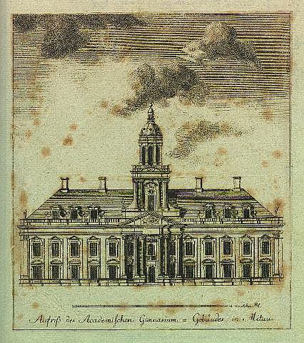 Scan from Johann Christoph Brotze's book Sammlung verschiedner Liefländischer Monumente. Aufriß des Academischen Gimnasium = Gebäudes in Mitau [die Ansicht; die Gravüre].